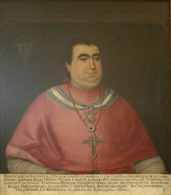 Retrato del eclesiástico español Juan Acisclo de Vera y Delgado (1761-1818), que llegó a ser arzobispo titular de Laodicea y auxiliar de Sevilla, presidente de la Junta Central durante la Guerra de la Independencia y, finalmente, obispo de Cádiz.